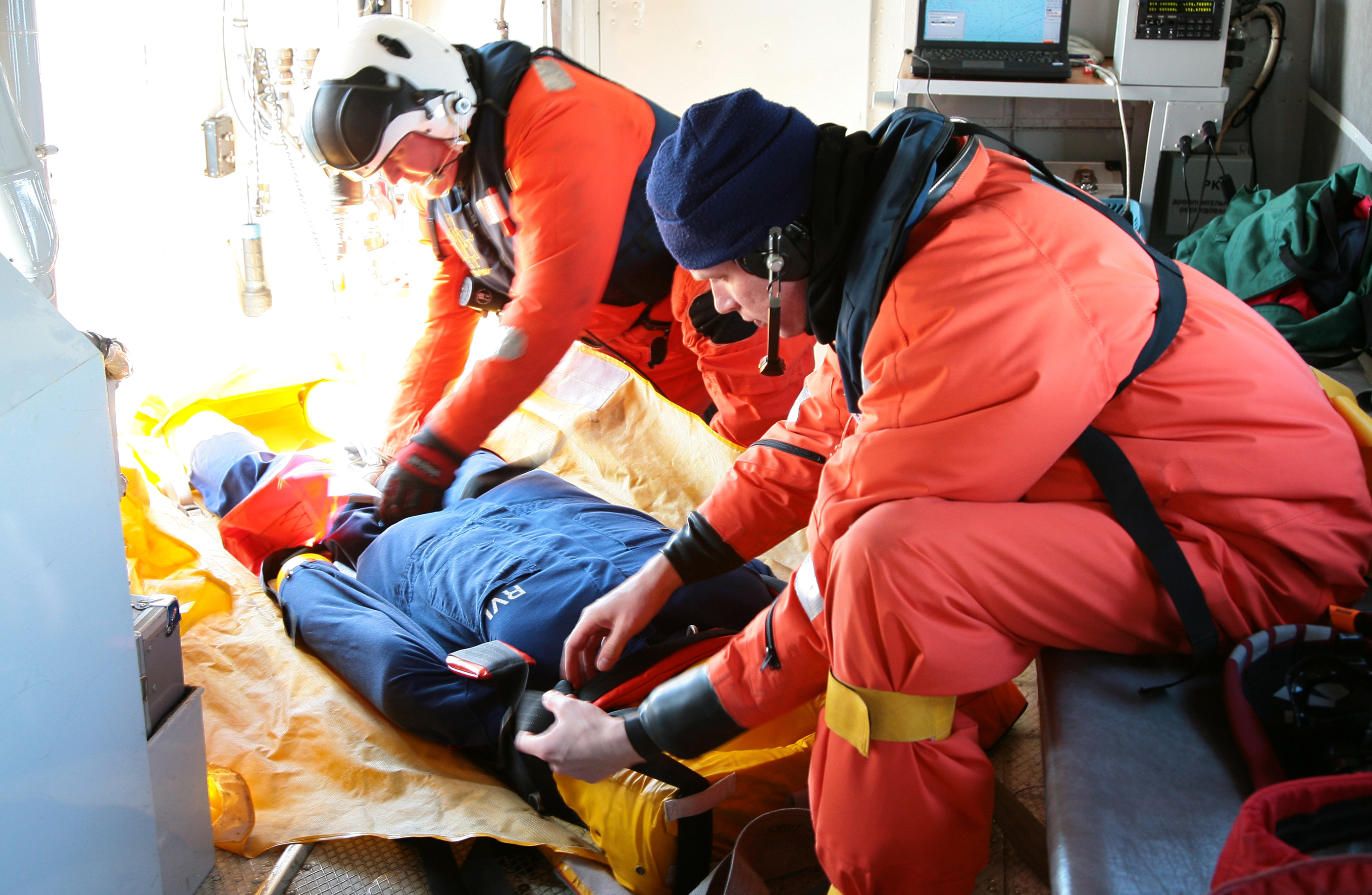 Piirivalve Lennusalk harjutamas haige esmavaatlust kopteril.